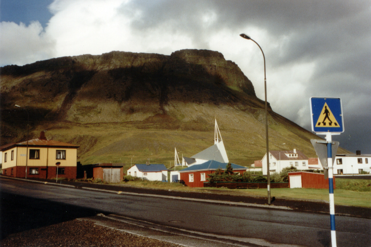 Ólafsvík_in_Iceland